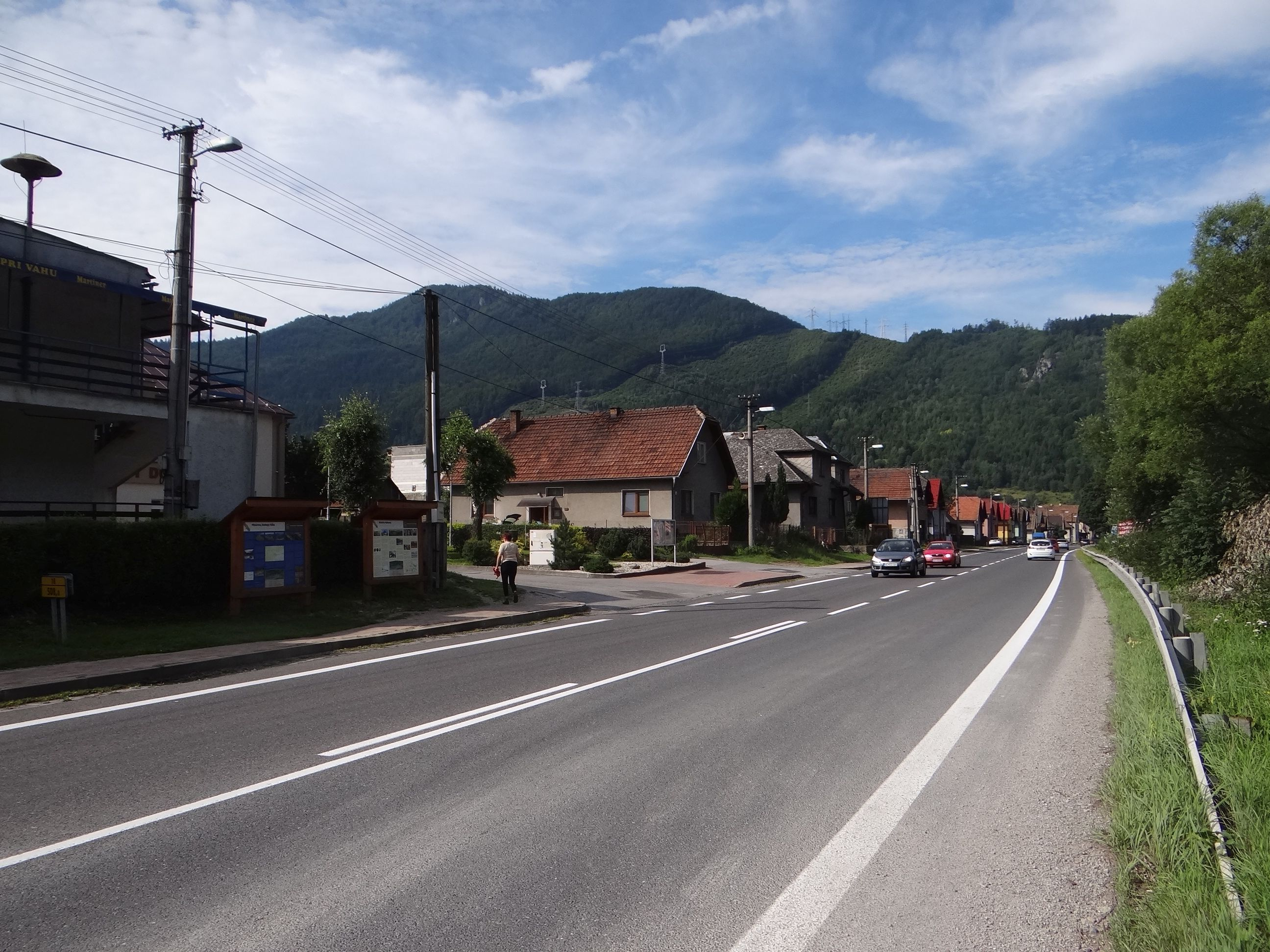 Hubová